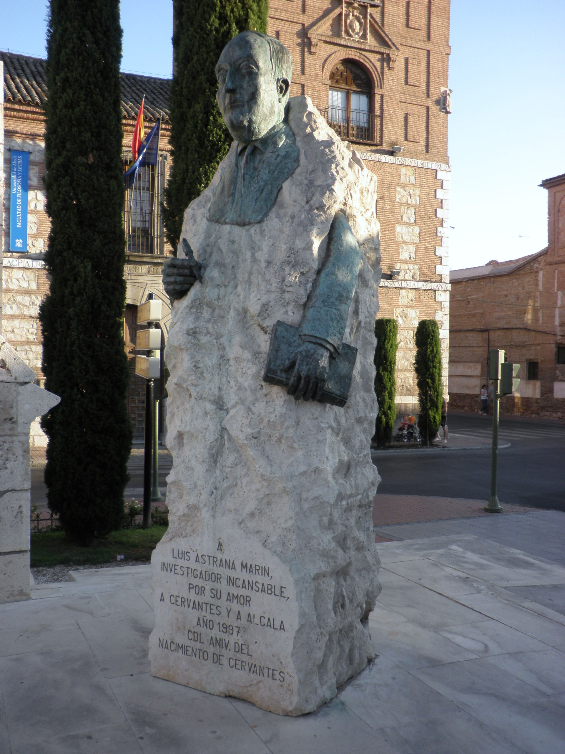 Escultura de Luis Astrana Marín en Alcalá de Henares (Comunidad de Madrid - España).